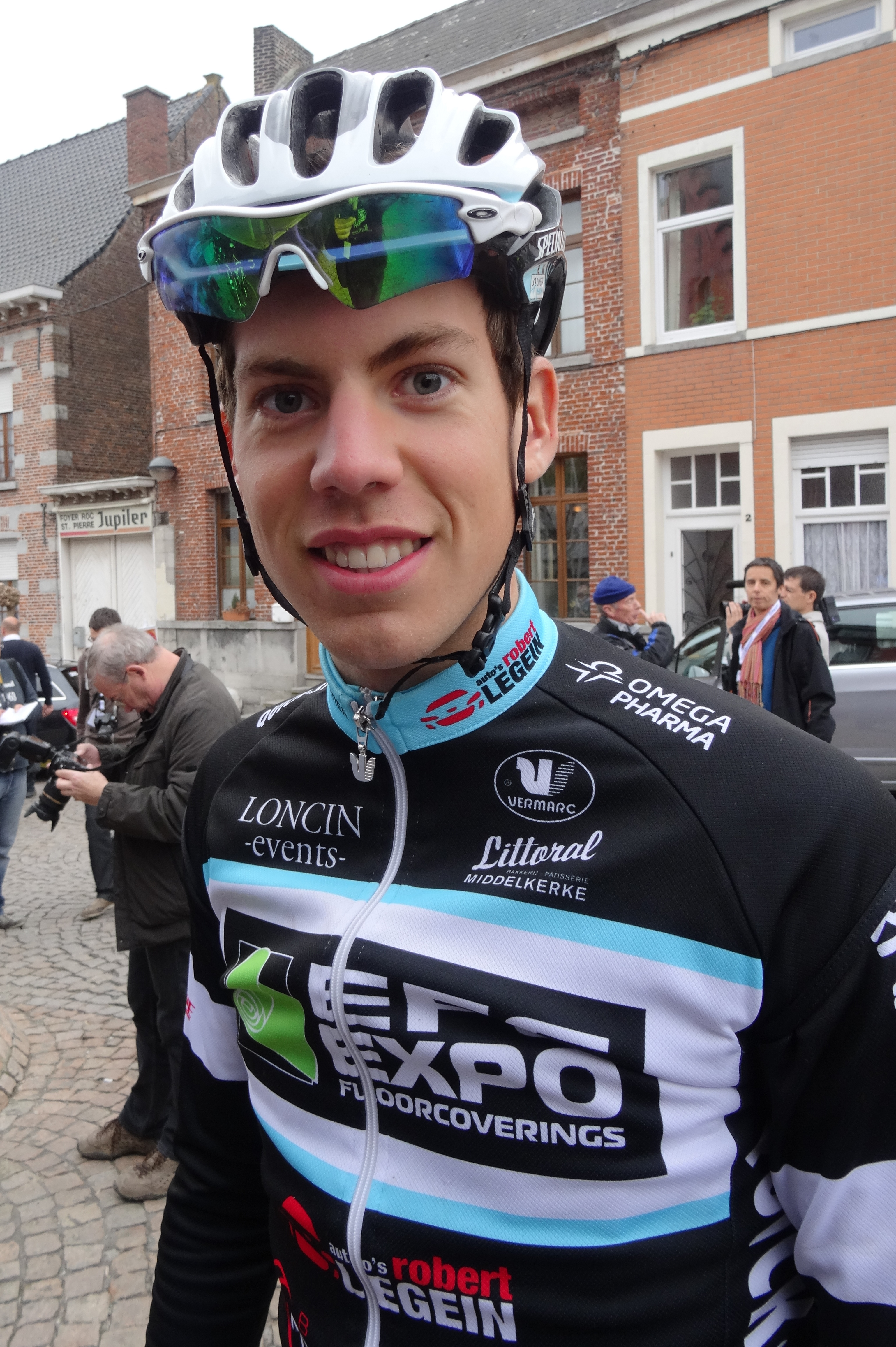 Triptyque des Monts et Châteaux 2014, étape 1, 4 avril 2014, départ d'Antoing. Depicted person: Benjamin Declercq Depicted team: EFC-Omega Pharma-Quick Step The creation of these files was made possible thanks to the organizers of the Triptyque des Monts et Châteaux 2014 English | français | +/−